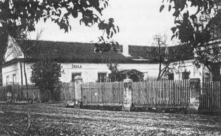 Obecná_škola_Bohdalice (Vyškov- Czech Republic)